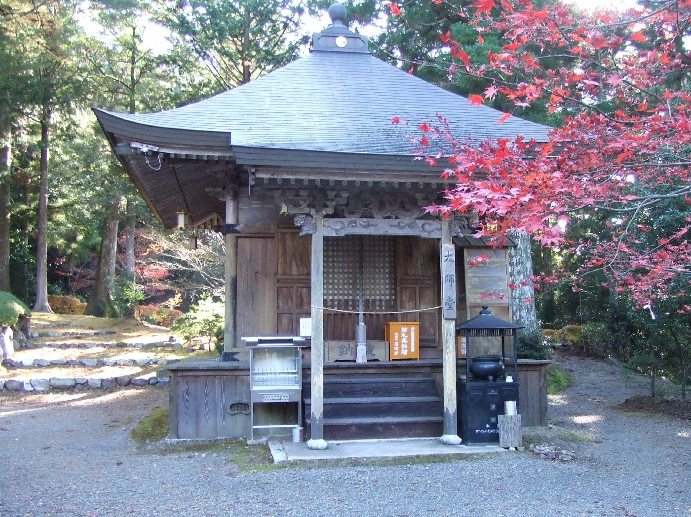 黒滝寺の大師堂